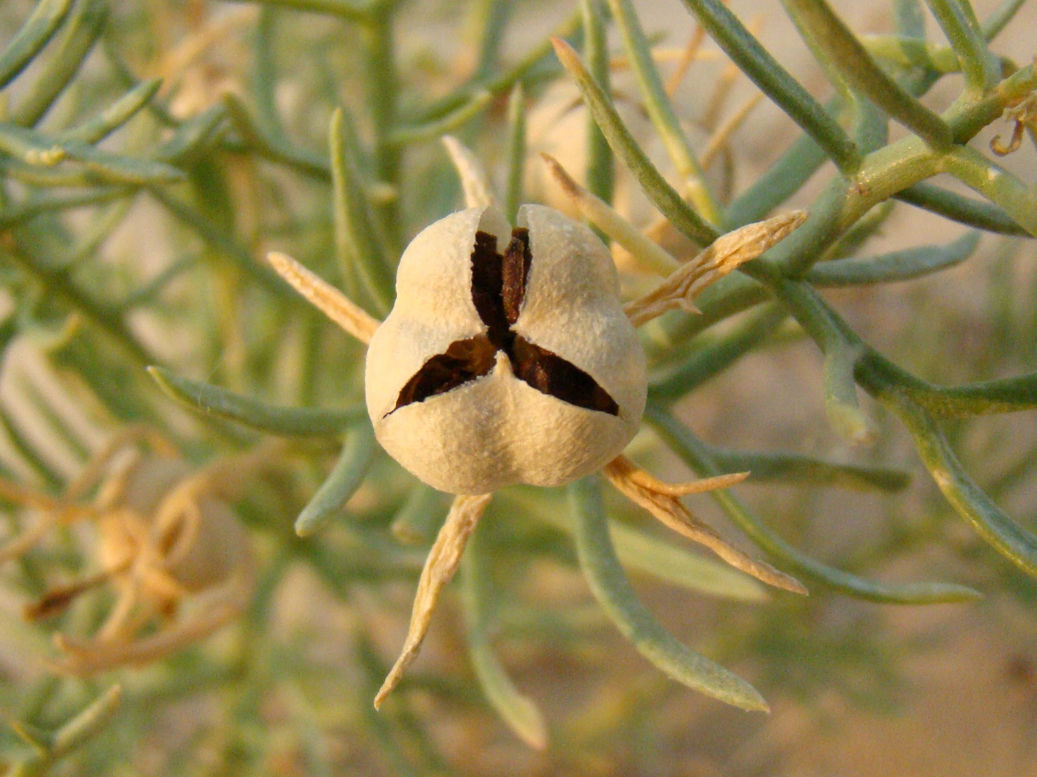 Гармала (Peganum harmala). Окрестости города Байконур, Казахстан